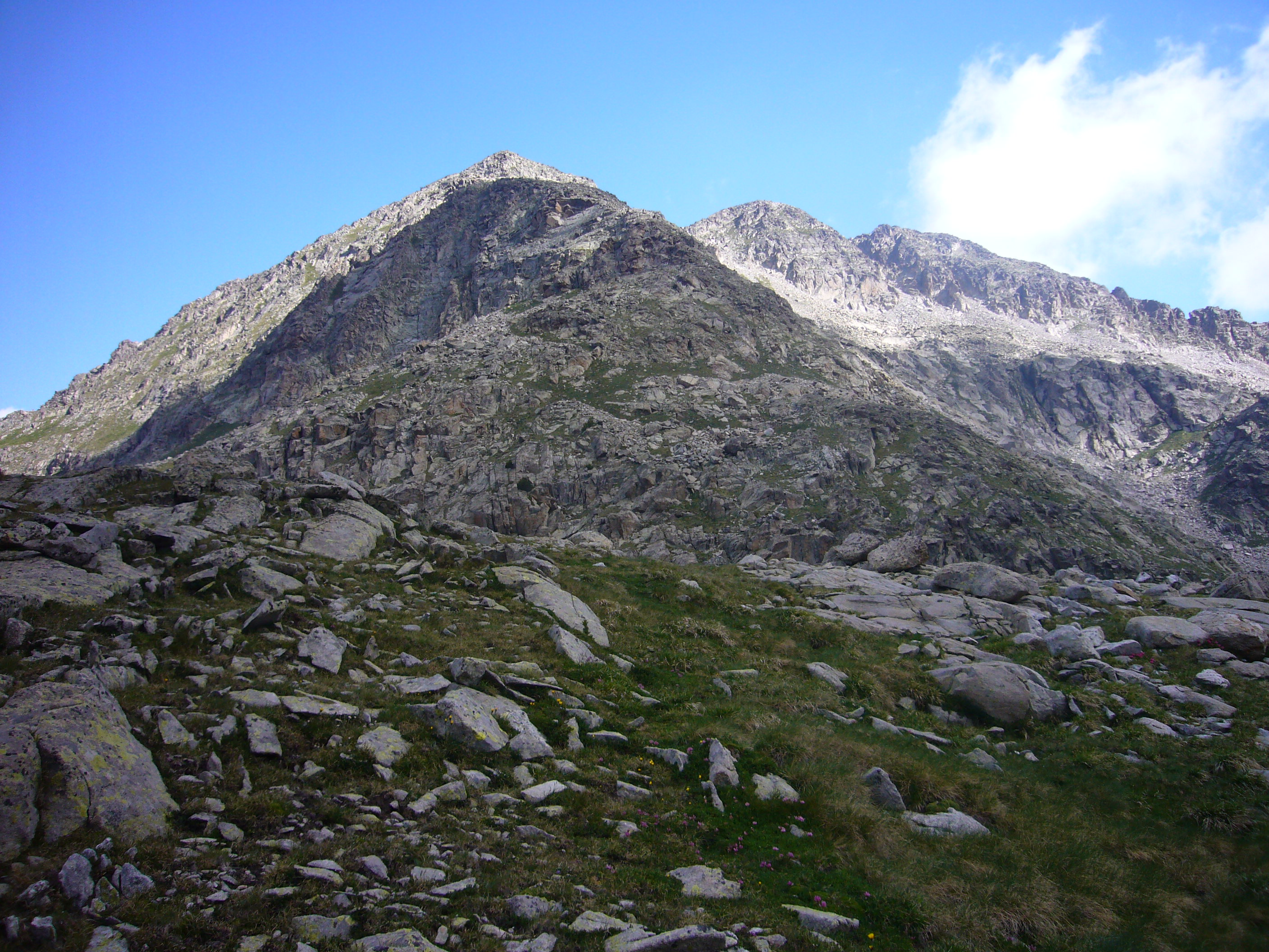 Pic i Punta Alta de Comalesbienes, vistos des de la Vall de Comalesbienes; la Vall de Boí, Alta Ribagorça, Catalunya